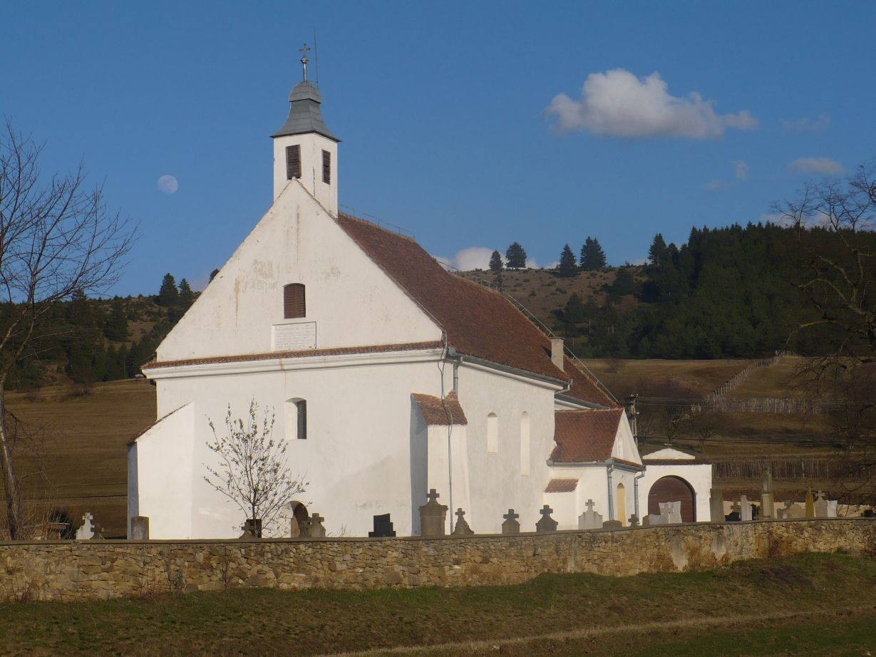 A haralyi római katolikus templom és temető